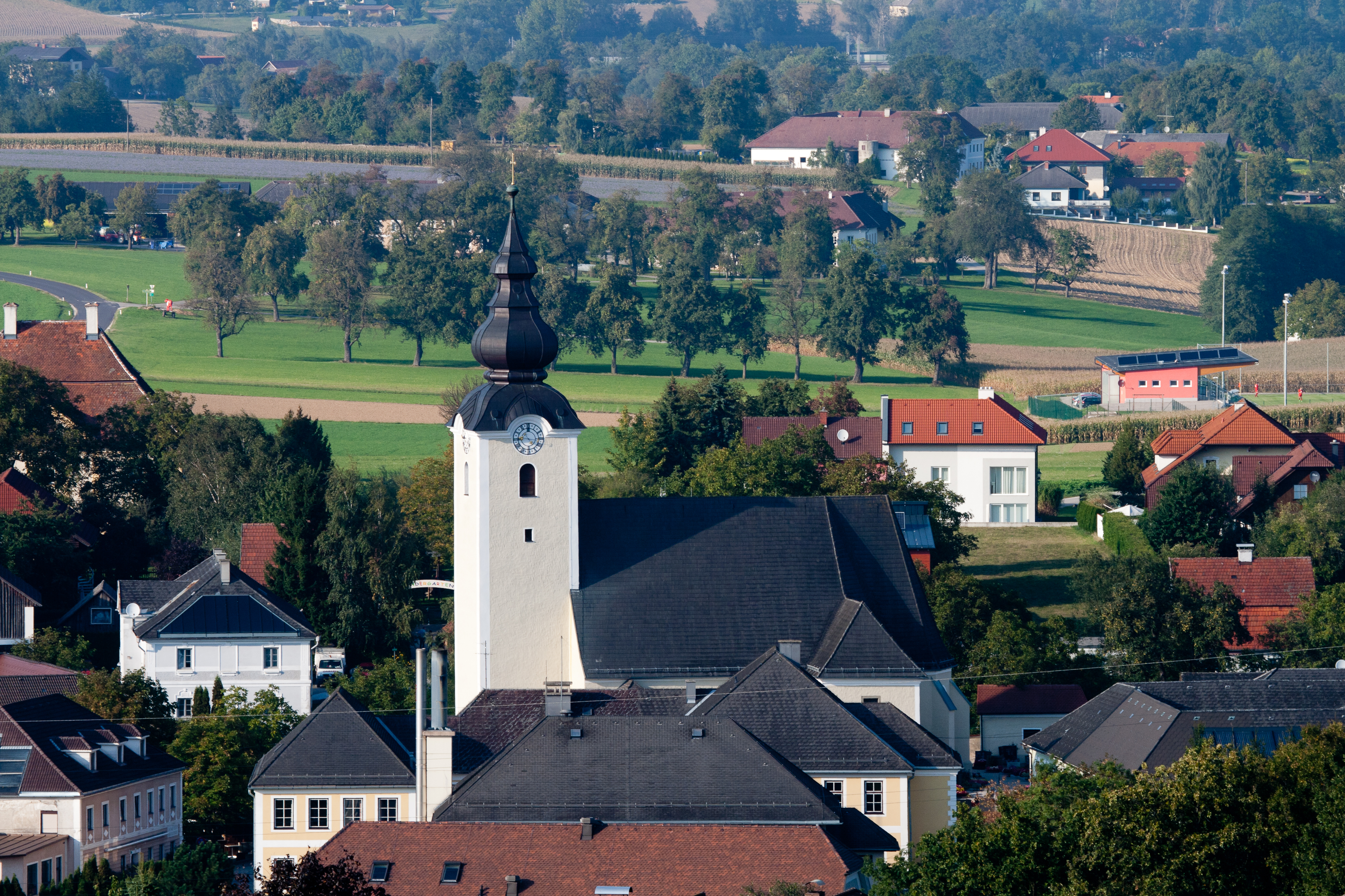 Kath. Pfarrkirche hl. Stephan und Friedhof